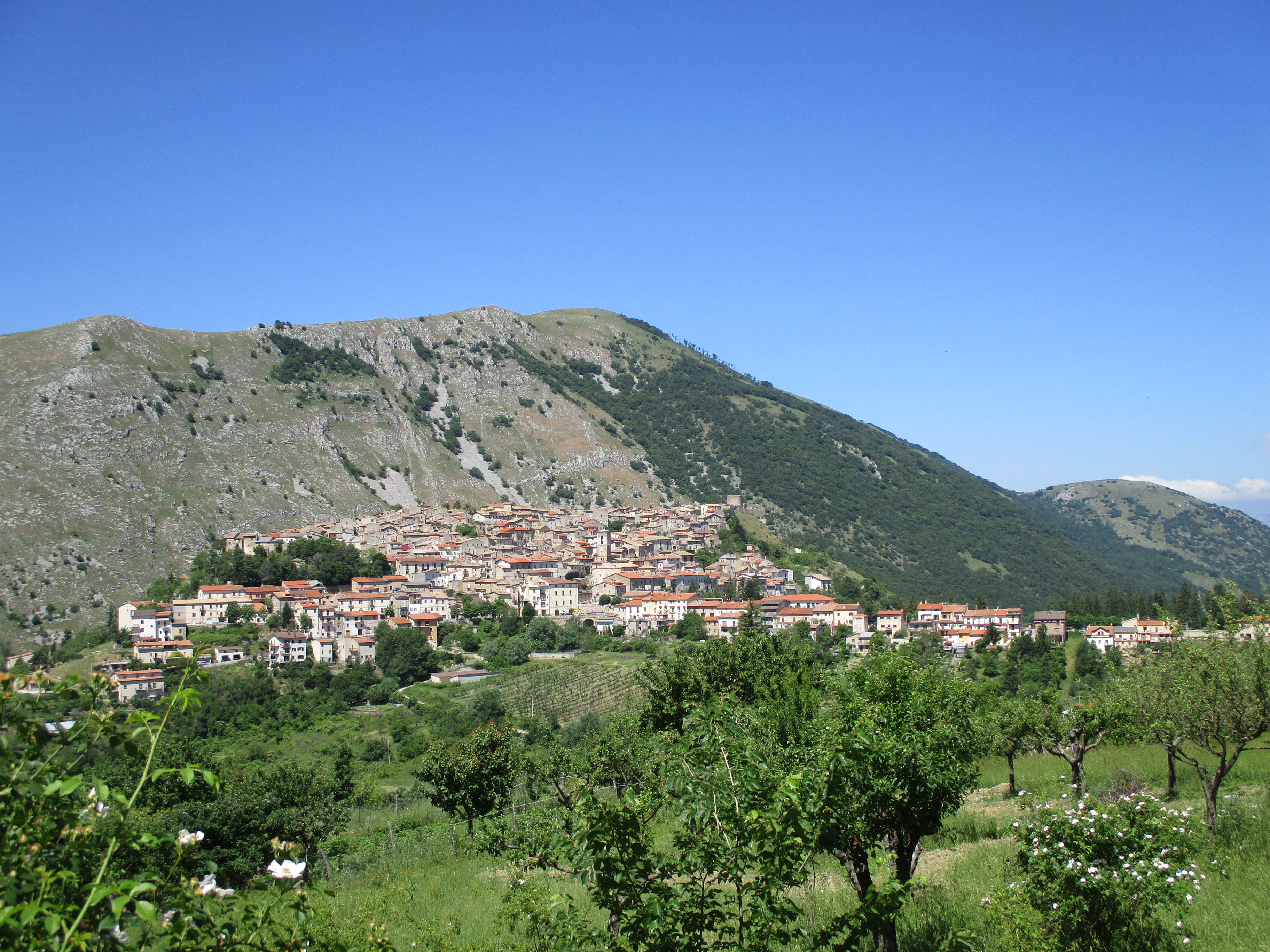 Veduta di Ortona dei Marsi